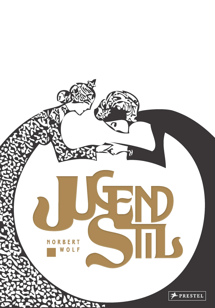 Norbert Wolf: Jugendstil. Prestel Verlag, München, 2011. DNB